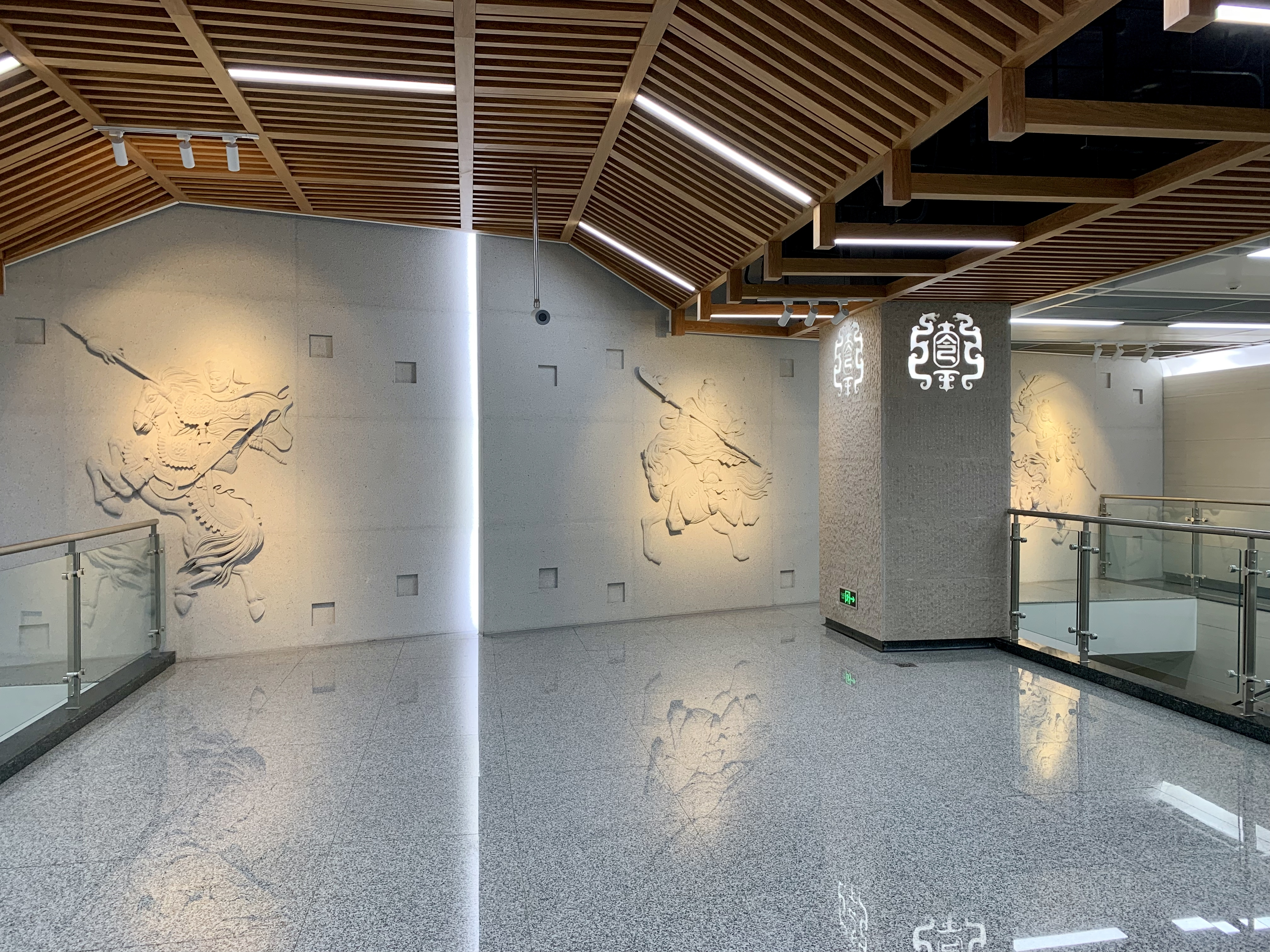 成都地铁马超西路站